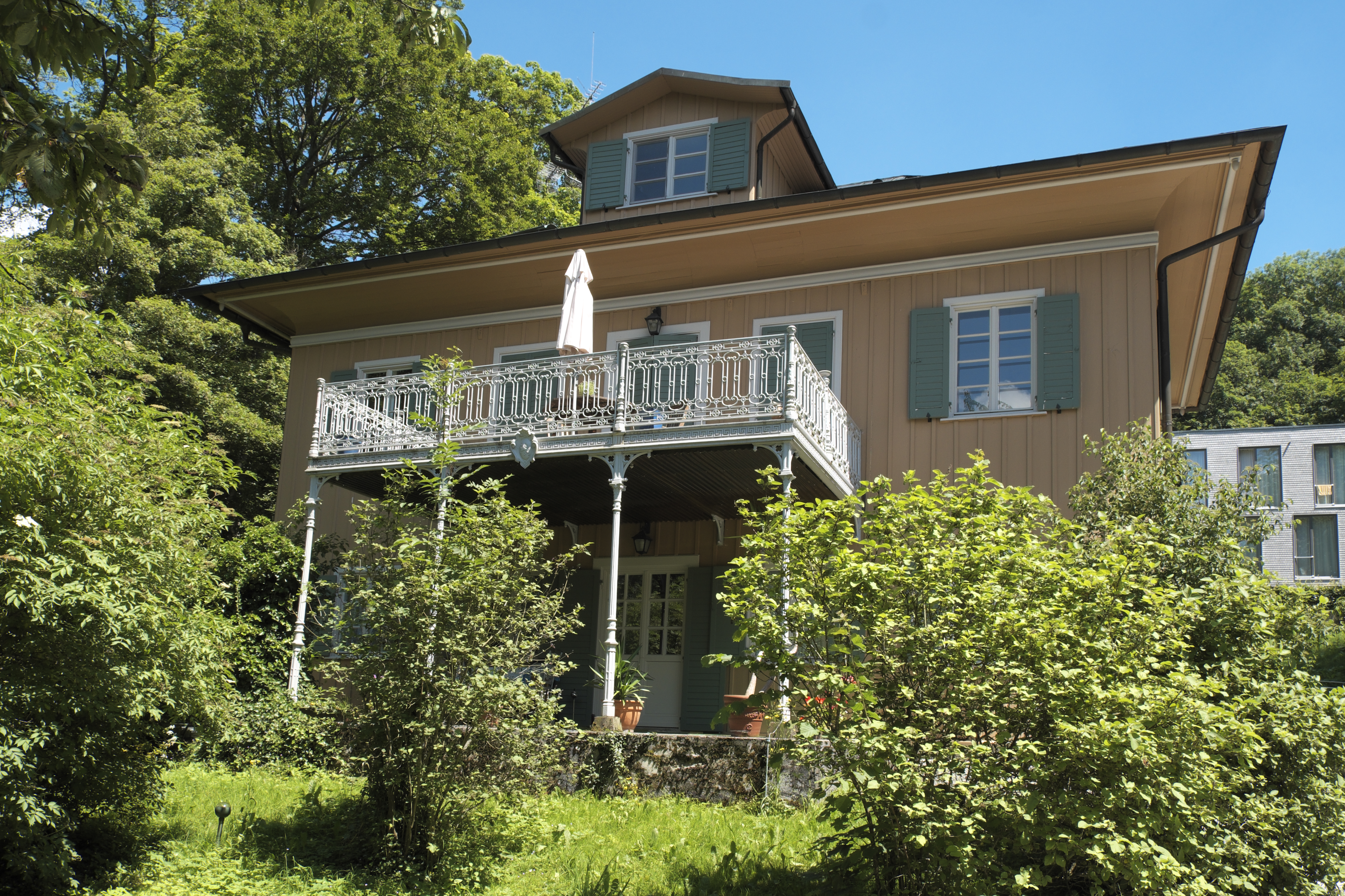 Villa Hackländer in Leoni, einem Ortsteil von Berg im Landkreis Starnberg (Bayern/Deutschland), Haus Buchenried der Münchner Volkshochschule